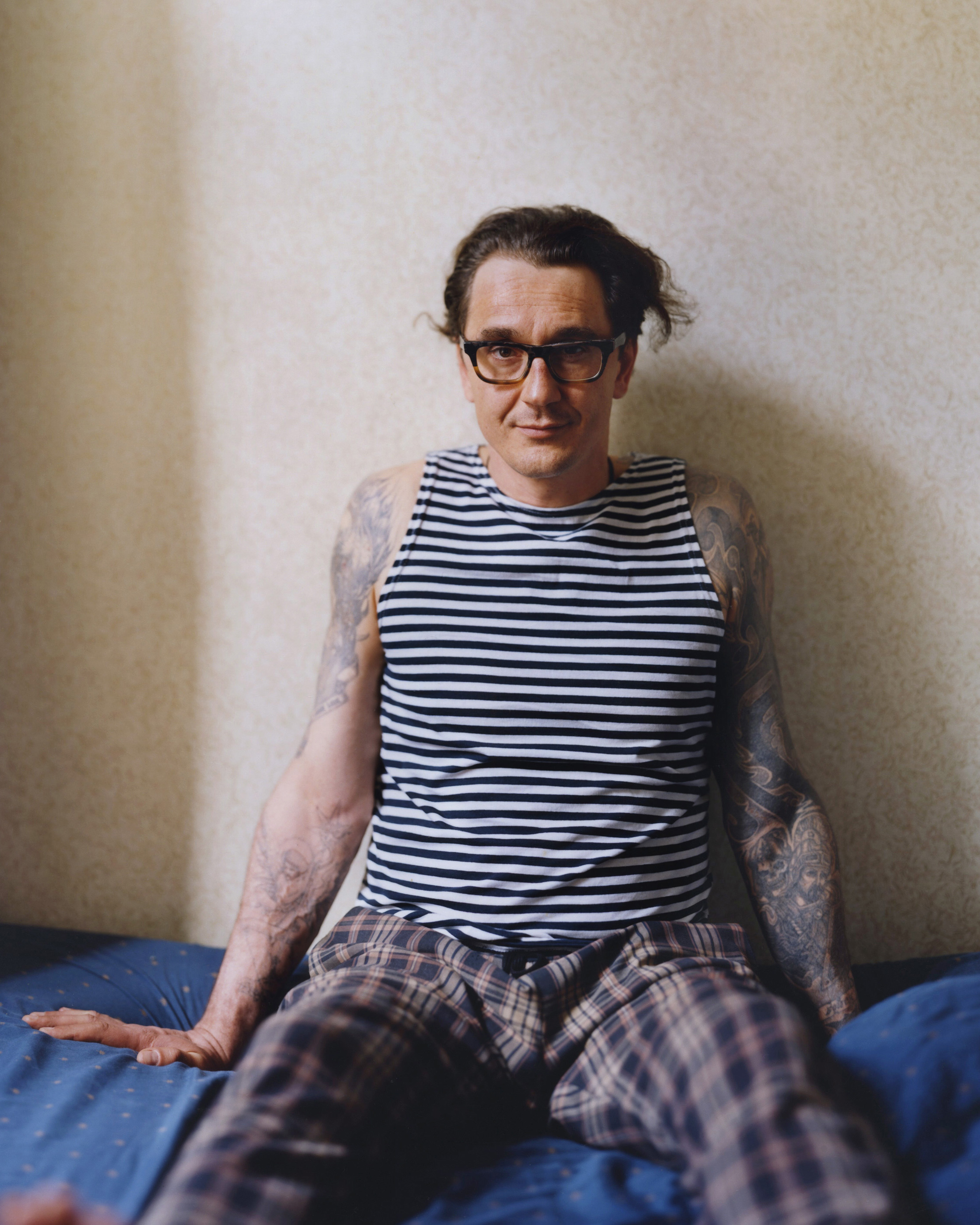 Стас Домбровский - фото Алек Сота 2018 года